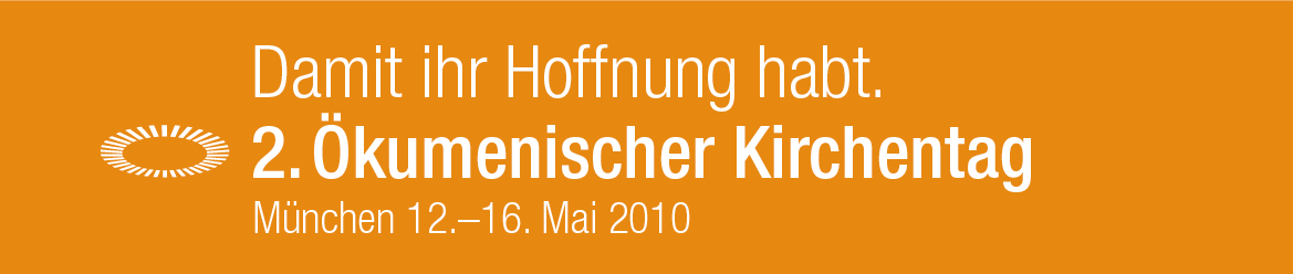 2Logo des 2. ökumenischen Kirchentages 2010 in München